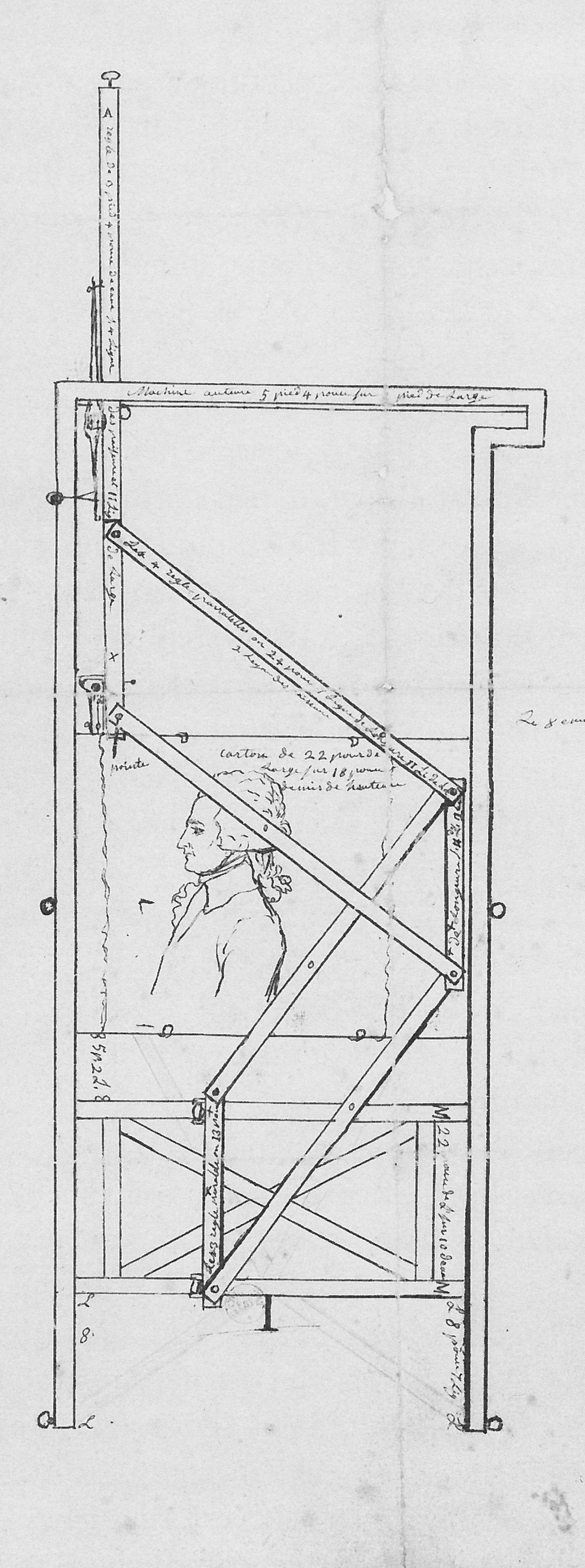 Physionotrace-Apparat, Zeichnung von E.Quenedey, Paris um 1790-1830 (BnF, Est.Dc 65b pet.fol.)